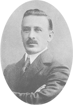 Борис Васильевич Зворыкин, русский художник.